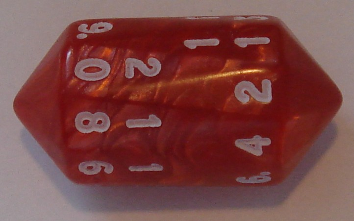 A 20-sided antiprism die